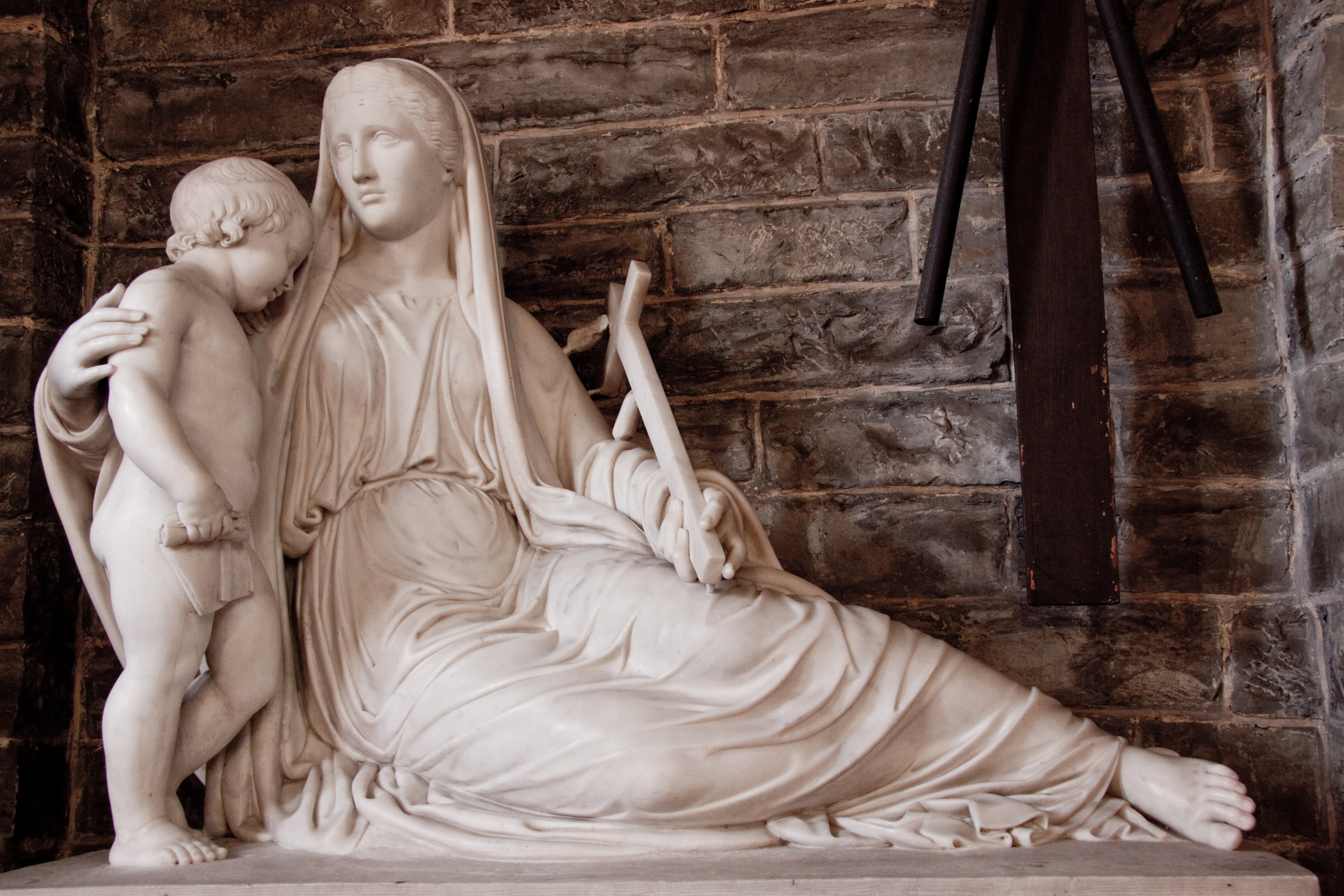 Onze-Lieve-Vrouw geboortekerk, Mariakerke (O-Vl.)